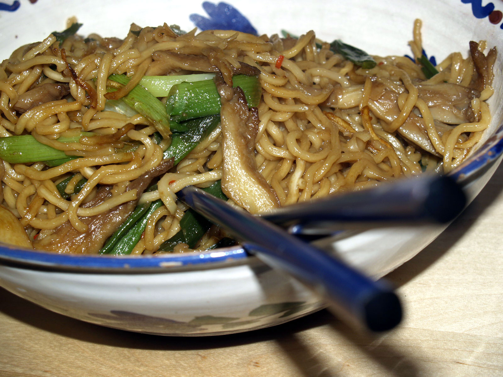 Stegte nudler med forårsløg og østershatte